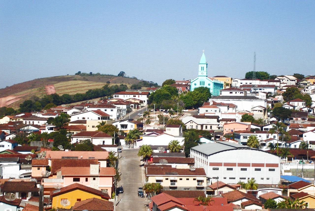 Vista Parcial da cidade de Poço Fundo